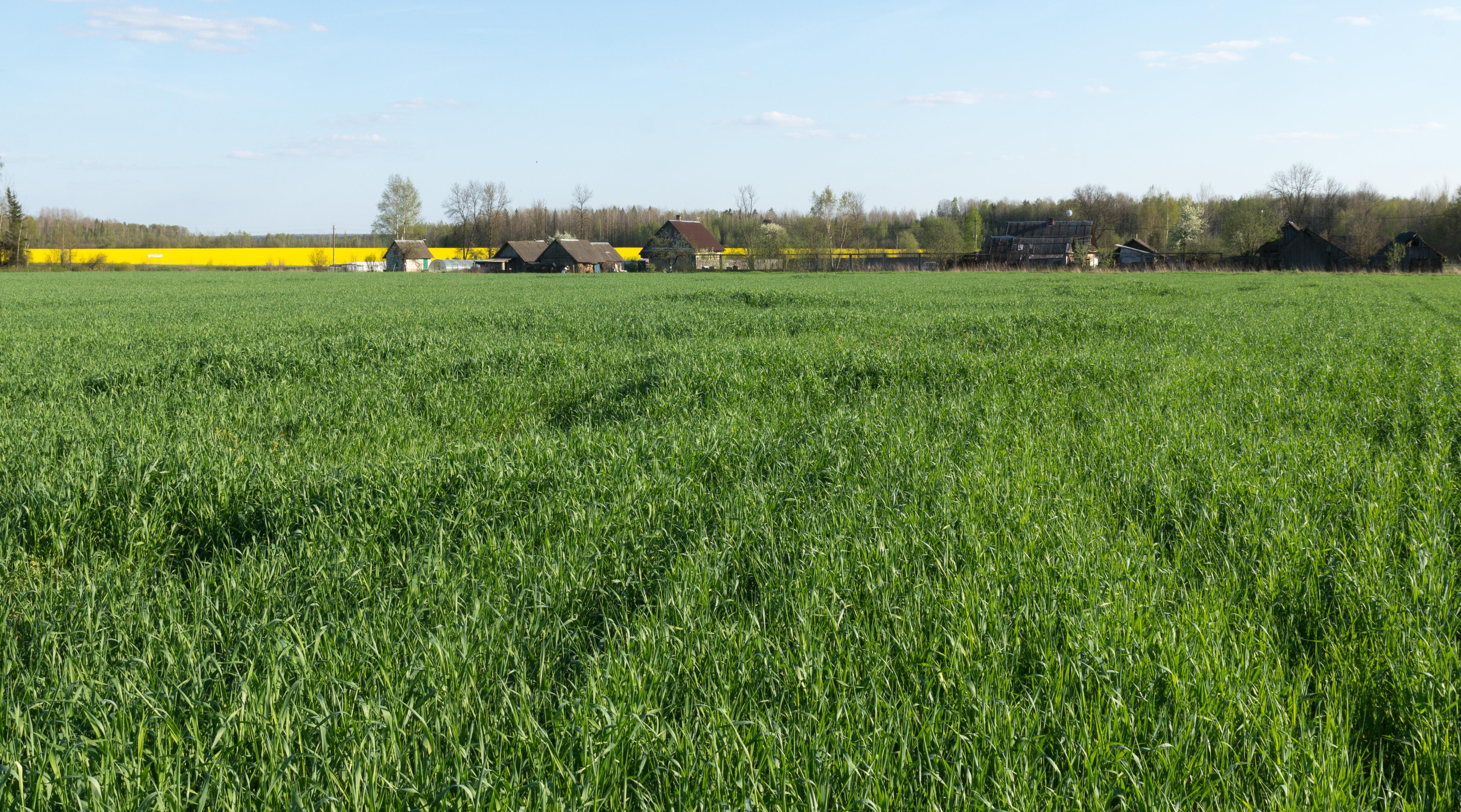 Мацькаўскія Пасекі (паўночны бок)